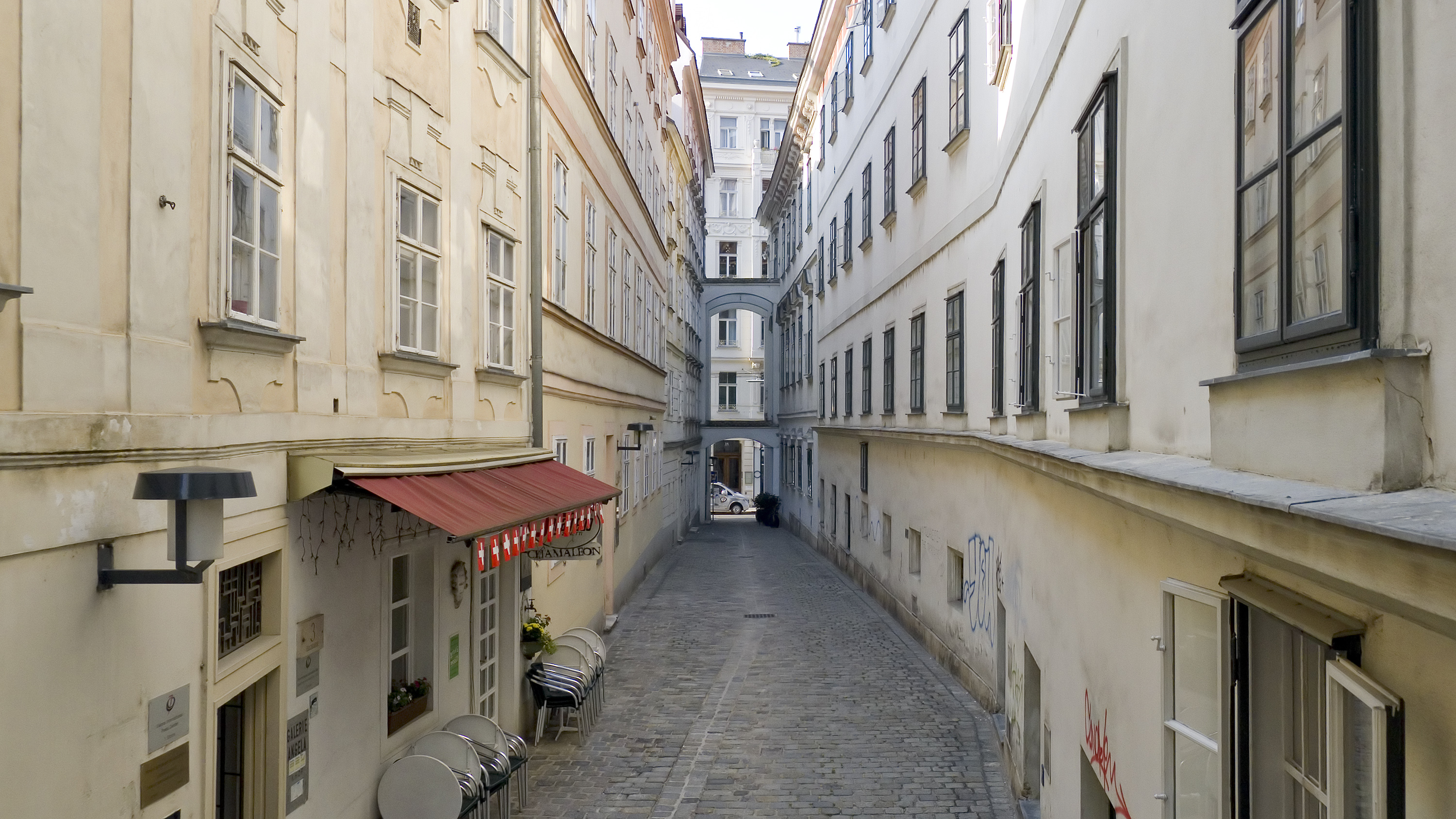 Blutgasse in Wien 1 bei Nr. 3 Richtung Süden